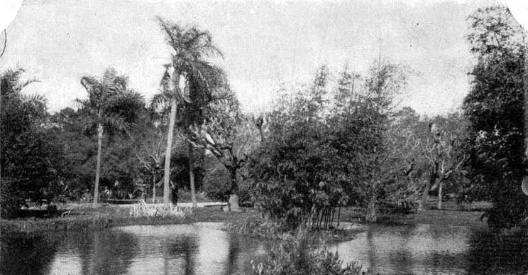 El Parque España en Buenos Aires, imagen de una laguna artificial que ya no existe.